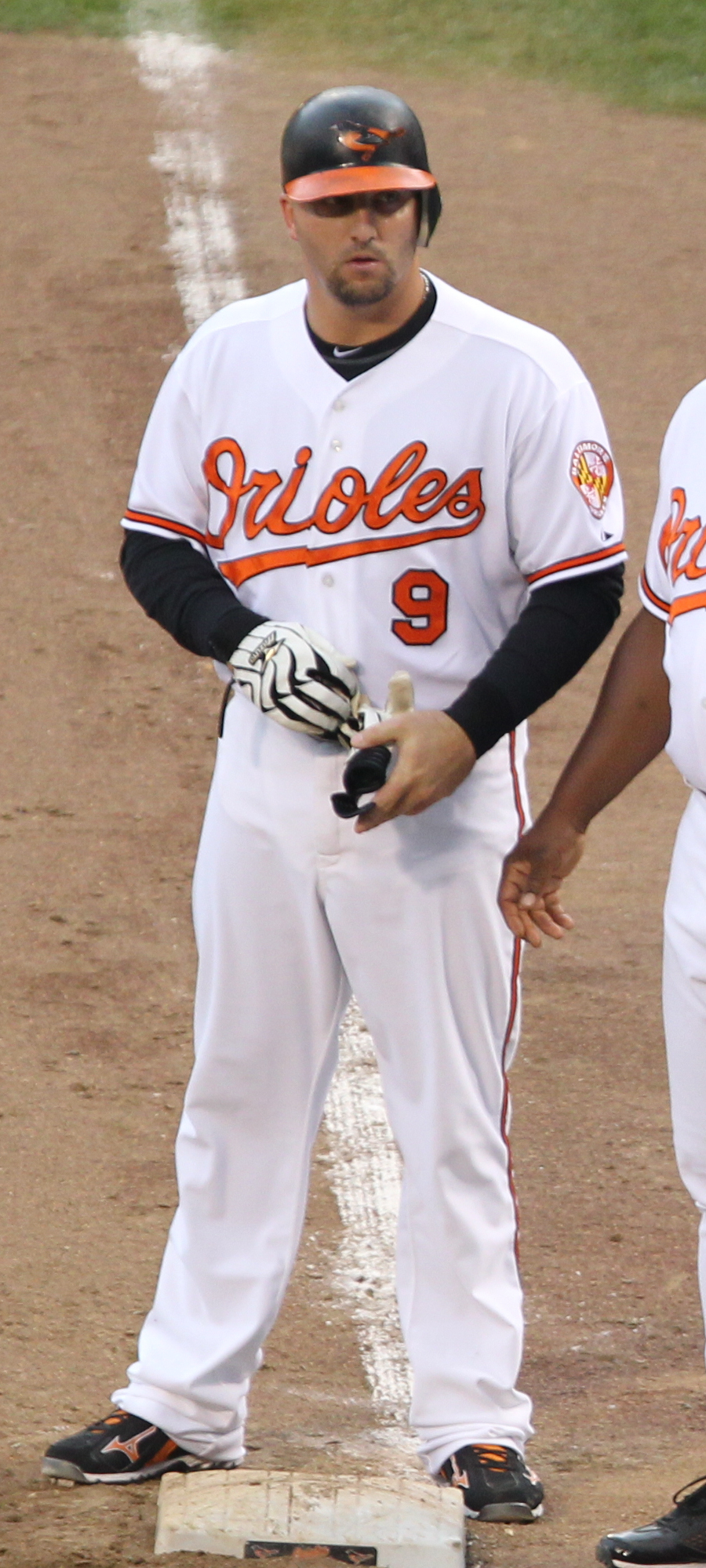 Jake Fox